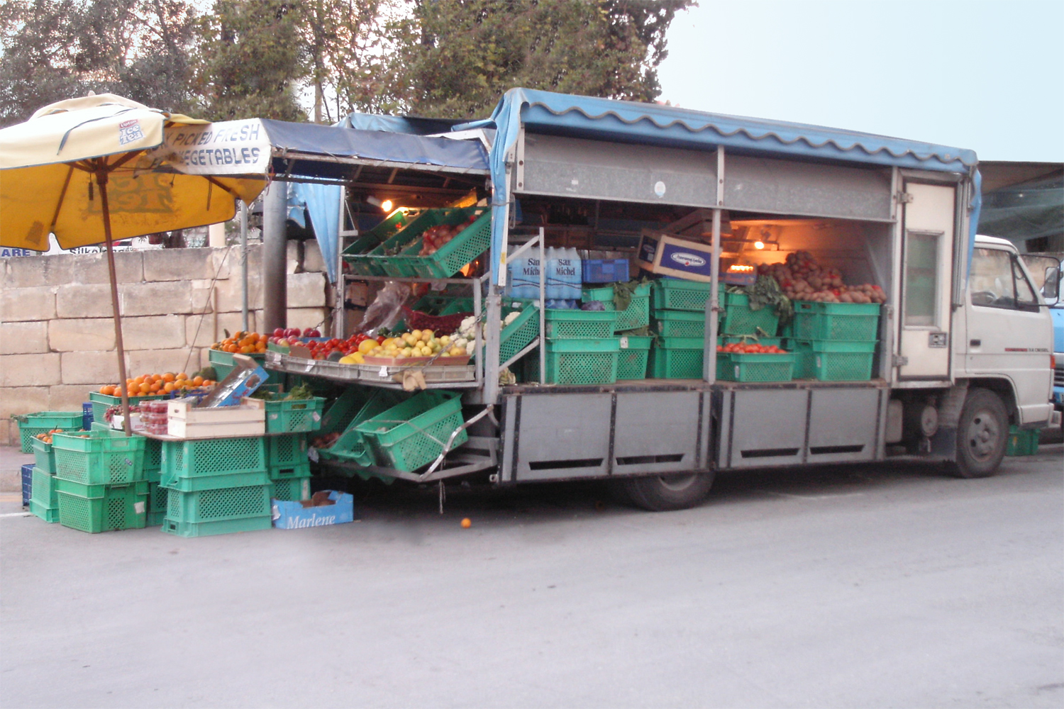 véhicule d'un producteur qui vend sa production directement aux consommatrices maltaises